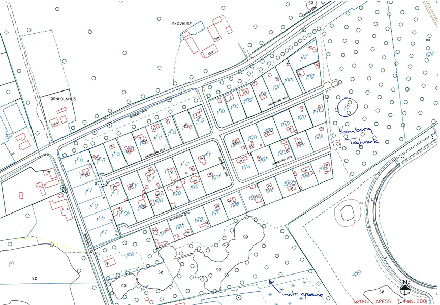 Matrikelkort over Julianelund